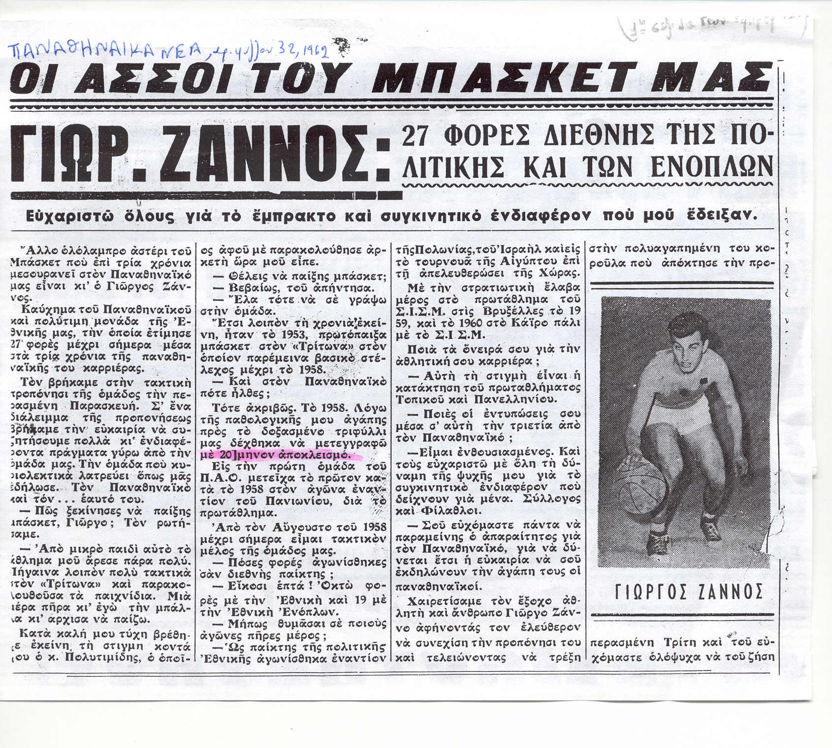 Γιώργος Ζάννος - δημοσίευμα